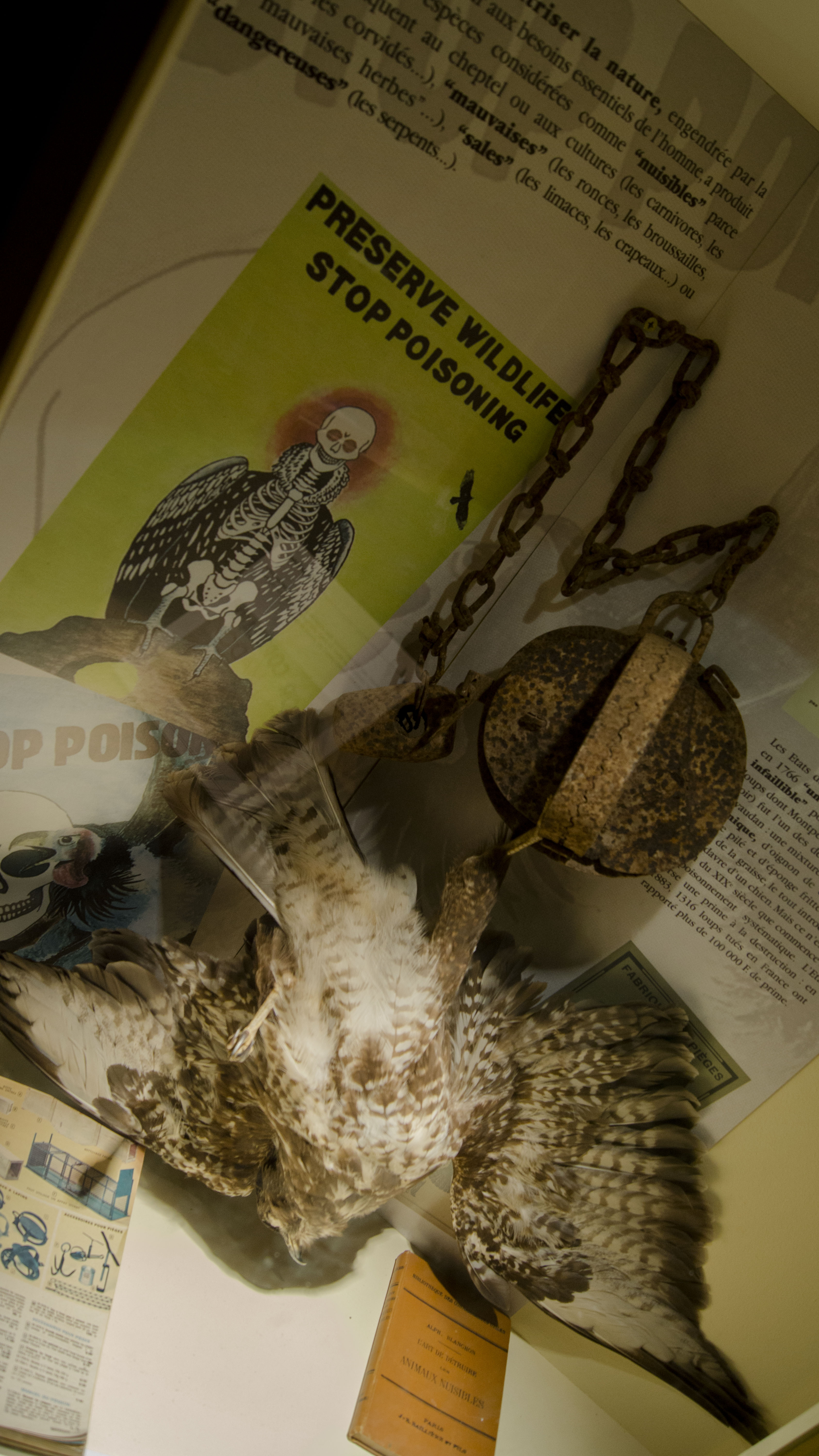 Extrait de la muséographie de la Maison des Vautours